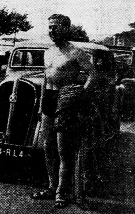 Jean Trévoux victorieux du rallye international de La Baule (1938).